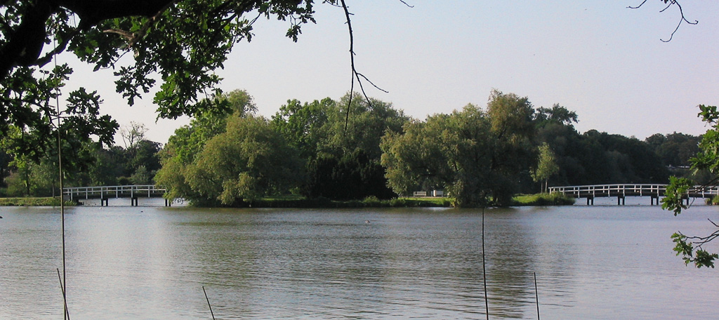 Beschreibung: die Weißen Brücken in Stralsund Fotograf: Darkone, 15. Juni 2005